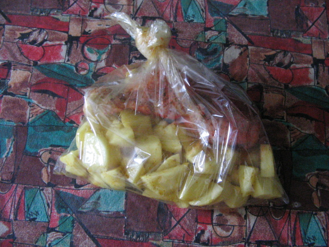 Vrečka za peko